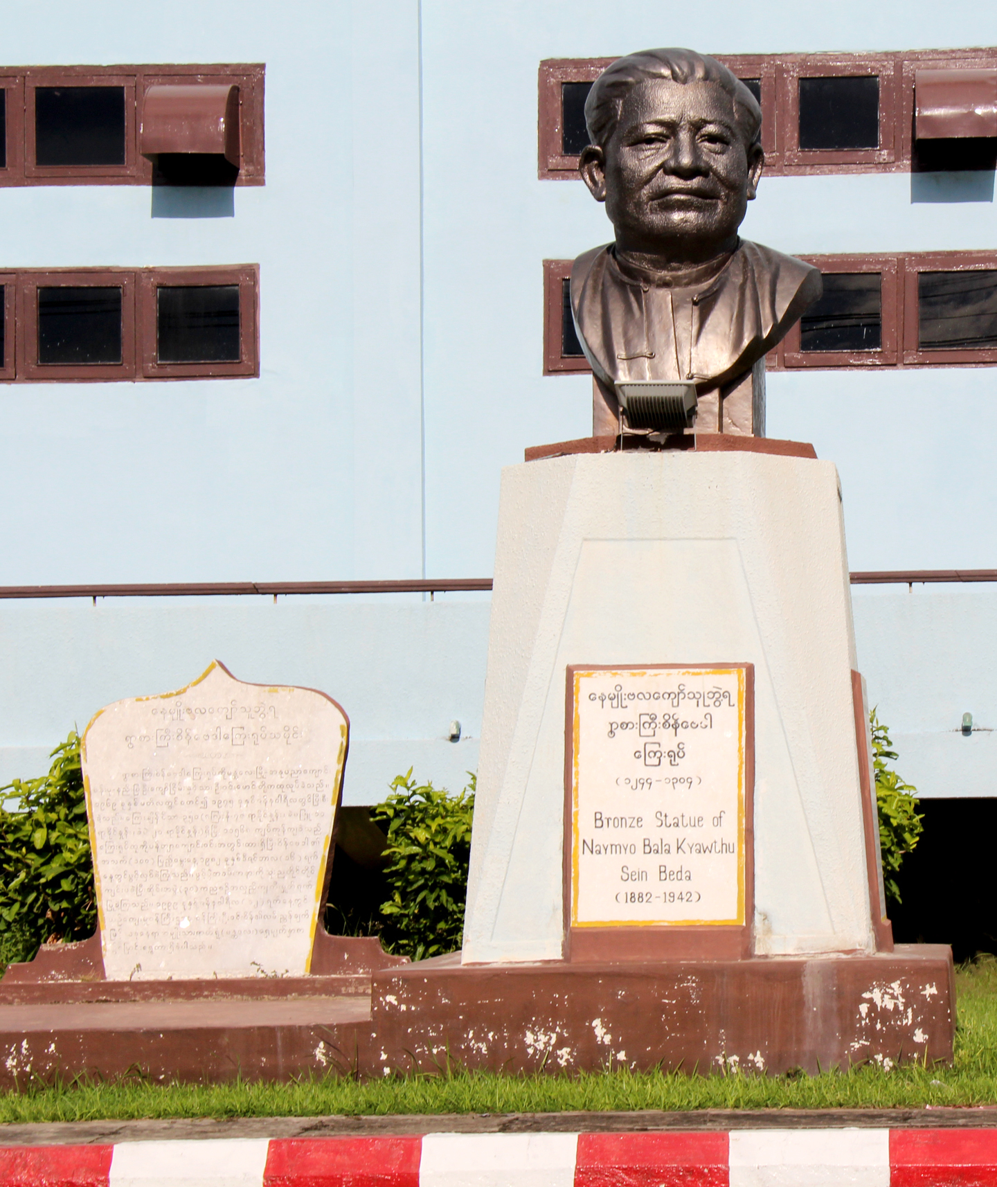 မြန်မာဘာသာ: မန္တလေး အမျိုးသား ကဇာတ်ရုံ ရှေ့ရှိ စိန်ဗေဒါရုပ်ထု